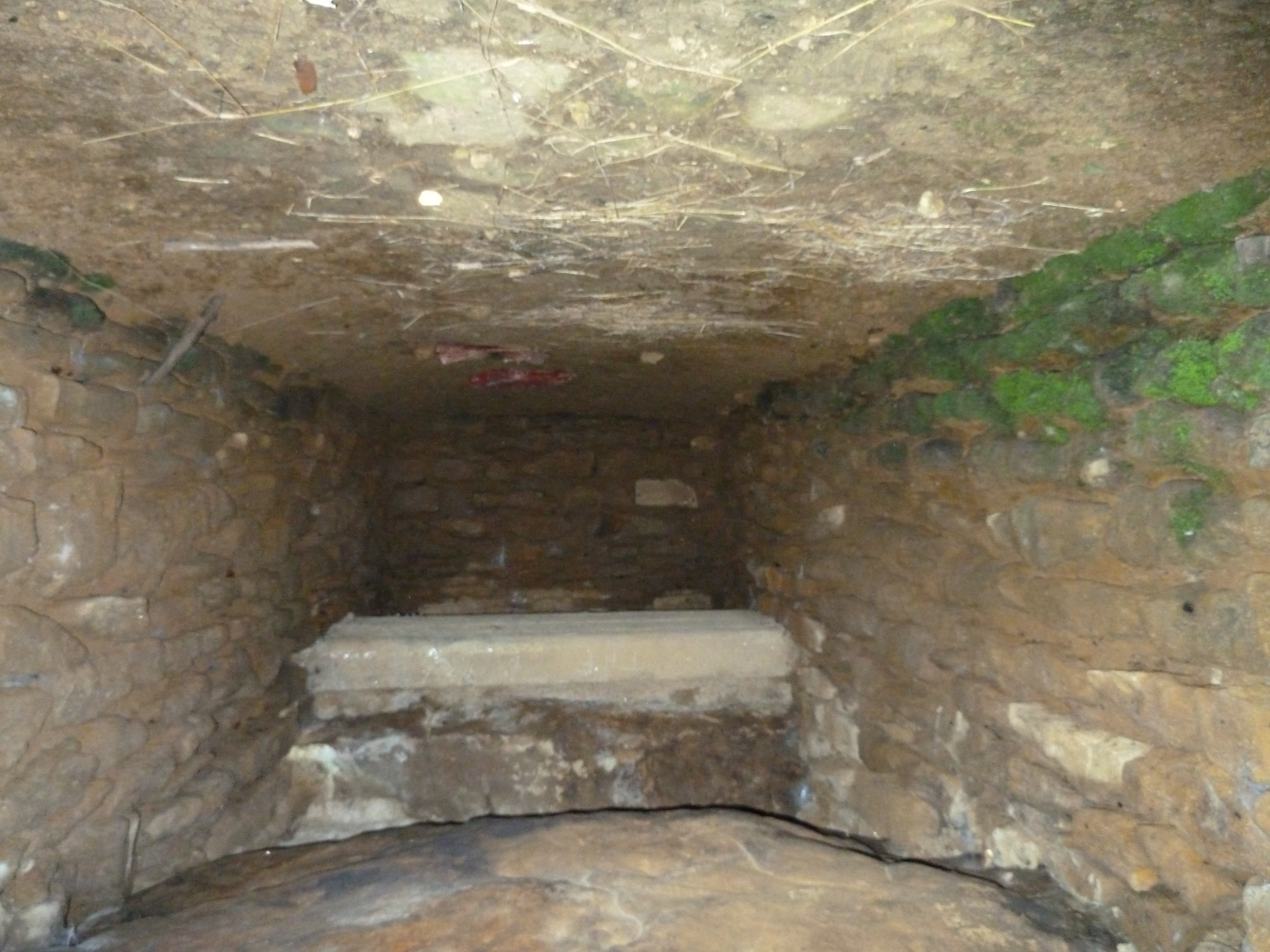 Allée couverte de Giraumont (intérieur) , Saint Marcel, Ardennes, France